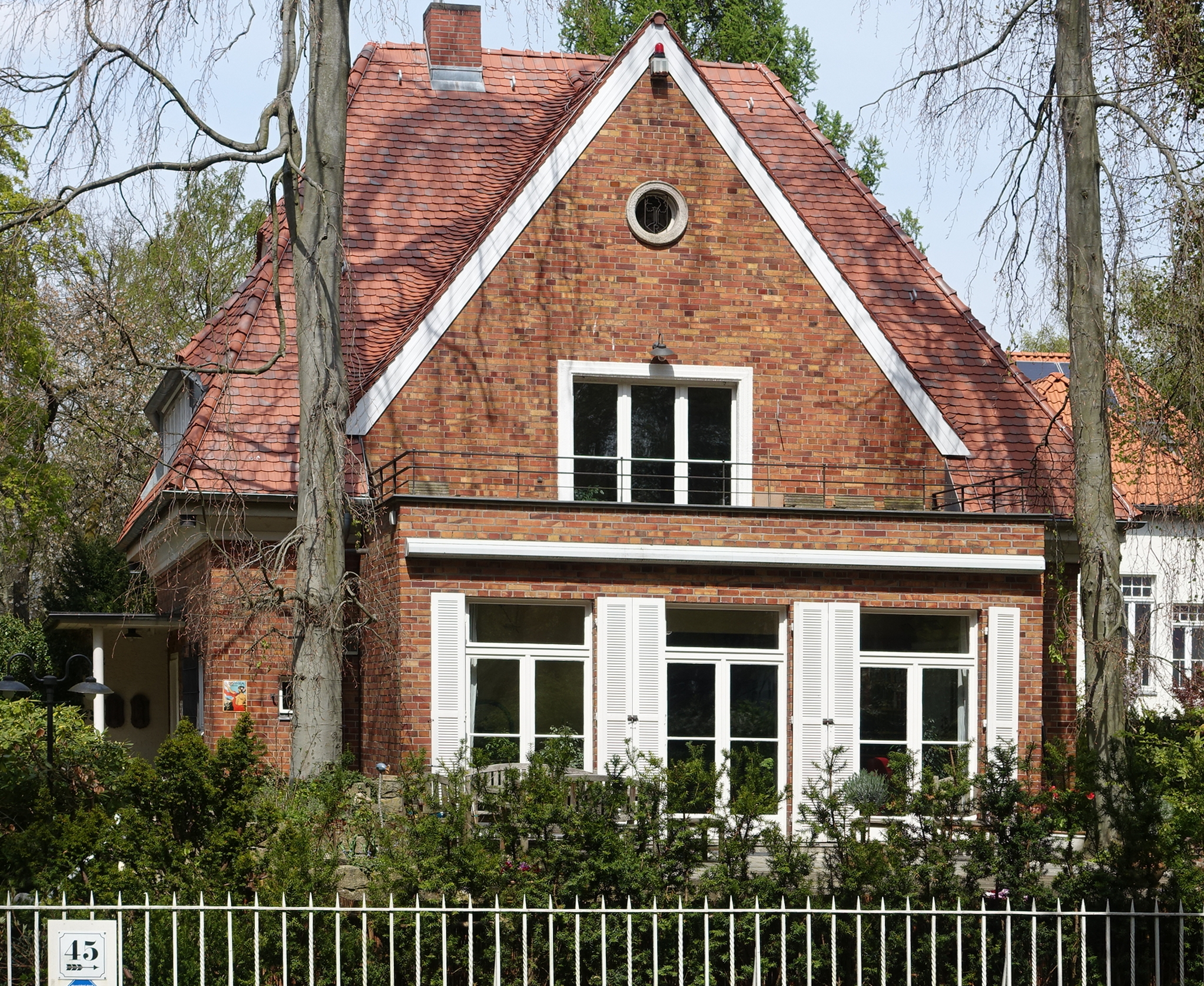 Wohnhaus